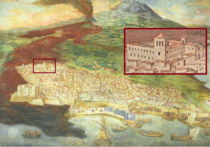 Celebre affresco del Platania nella sagrestia del Duomo di Catania che riproduzione l'eruzione etnea del 1669. Si trova evidenziato il convento dei padri benedettini.